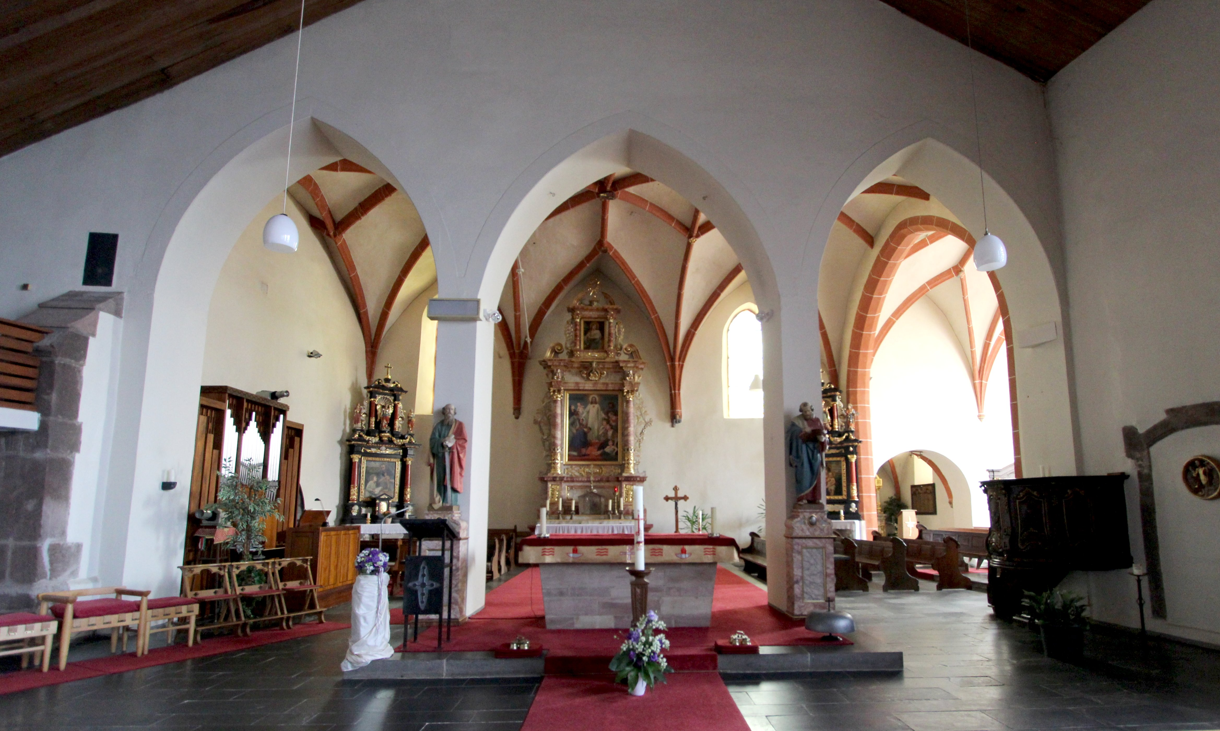 54597 Auw bei Prüm, Rother Straße 1. Spätgotischer Saalbau, massiger Westturm, im Wesentlichen um 1511/31, eventuell mit älteren Teilen, Kapellenanbauten angeblich von 1652; mit Ausstattung; Pfarrergrabplatte, um 1775. Aufnahme von 2017.